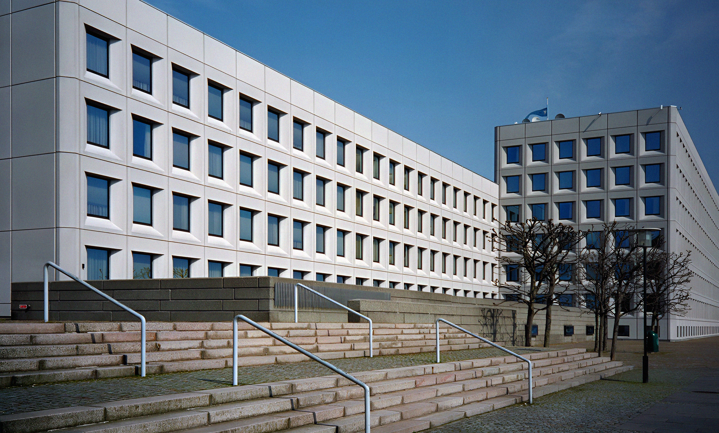 Maersk's huvudkontor vid Esplanaden i Köpenhamn 2000.